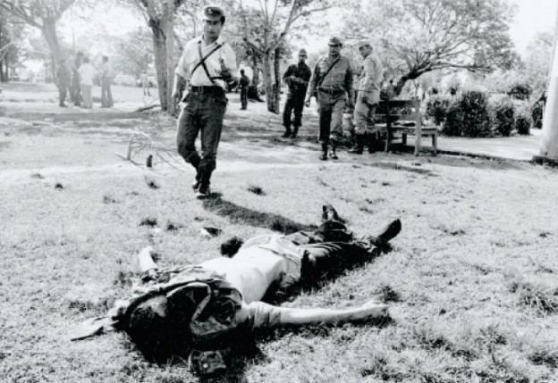 Combatiente abatido en el ataque al Regimiento de Infantería de Monte 29